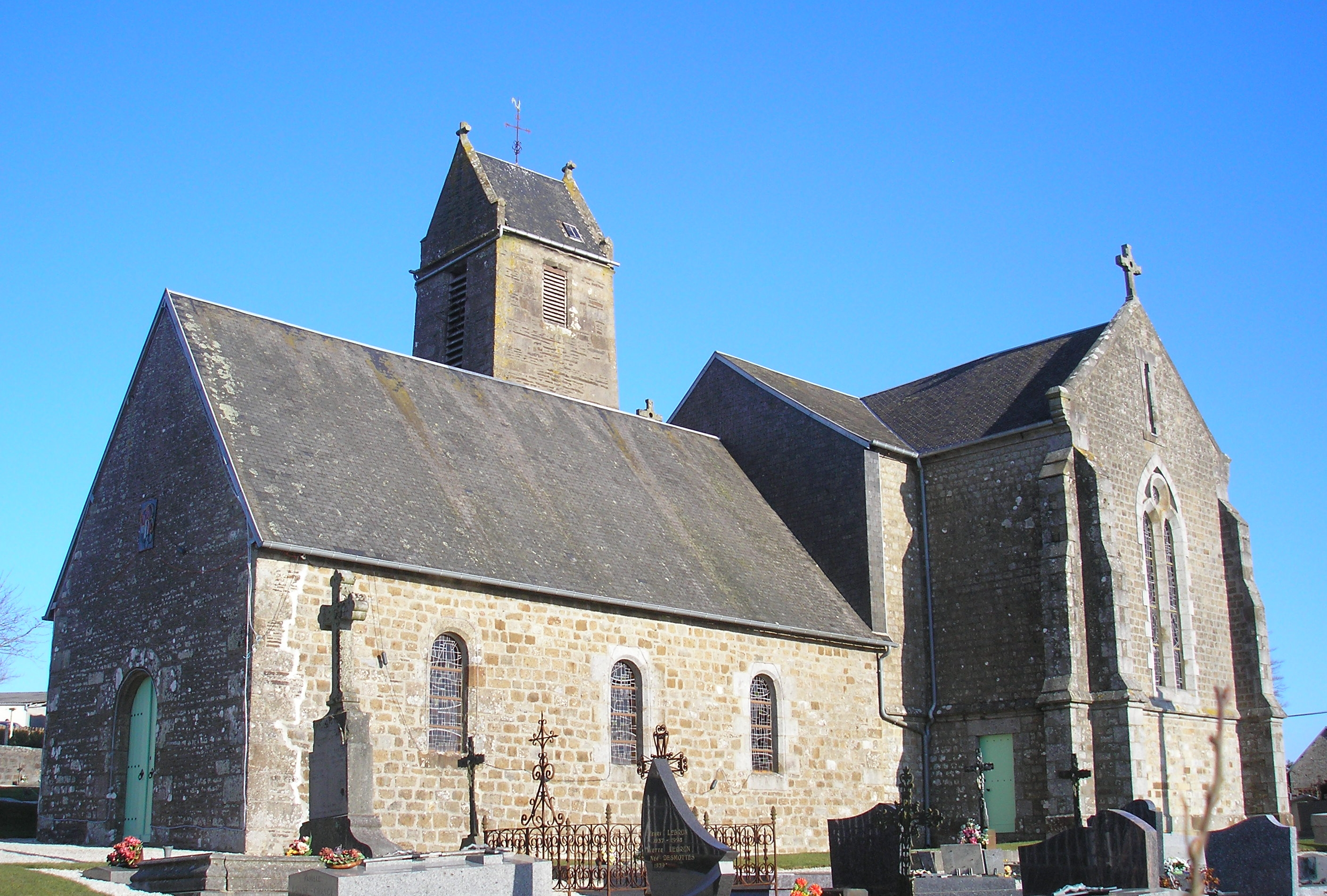 Perriers-en-Beauficel (Normandie, France). L'église.